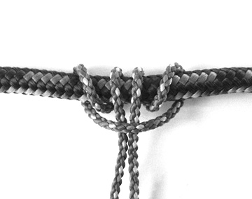 Prusik knot